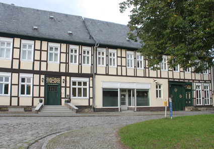 Nach einer umfangreichen Sanierung wird das älteste Geschäftshaus von Kalbe (Milde) heute wieder von verschiedenen Firmen und einem Hotel genutzt.